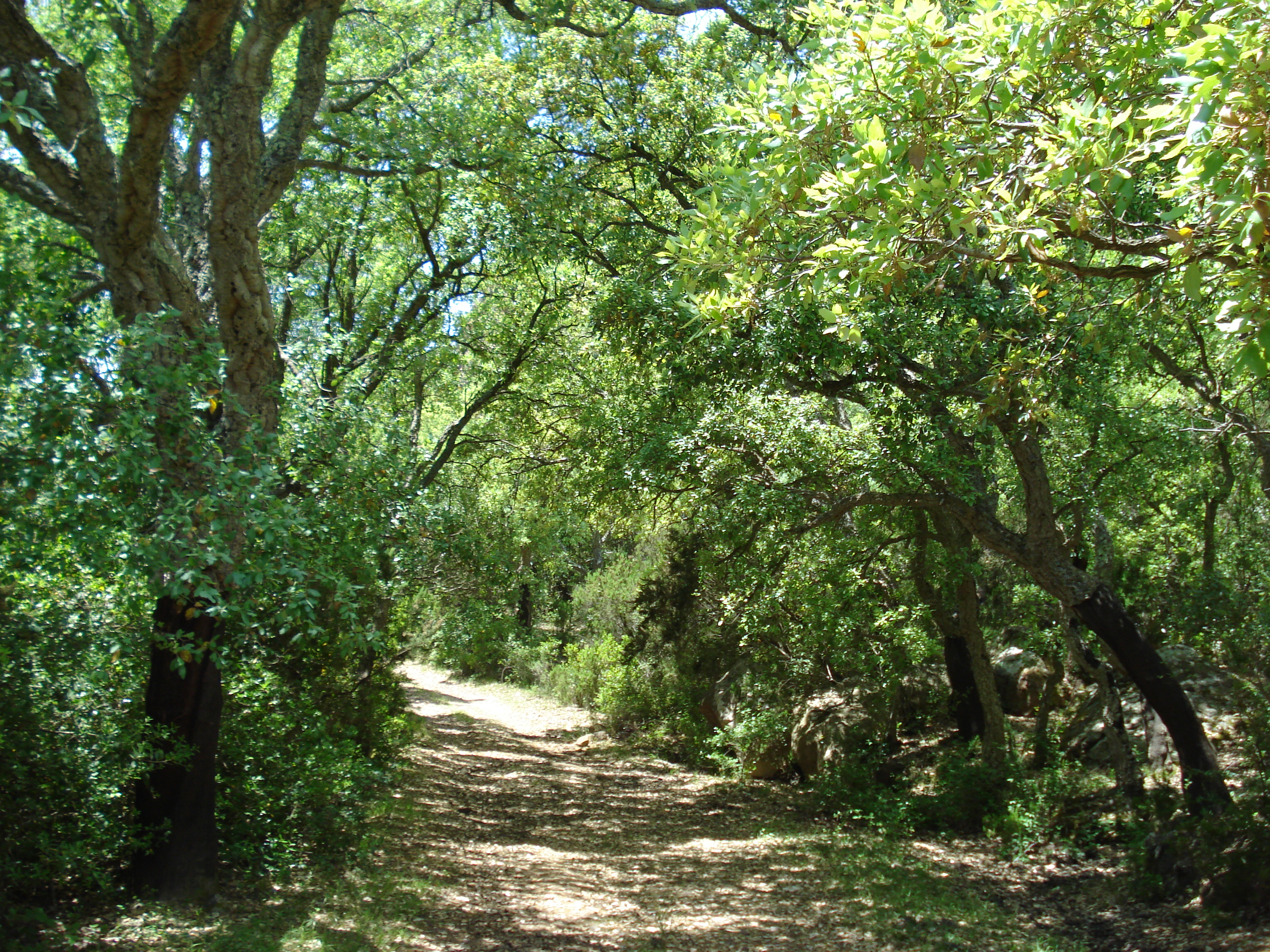 Forêt de chêne-liège au Jebel Sidi Mohammed près de Cap Negro, Nord-Oued de la Tunisie.